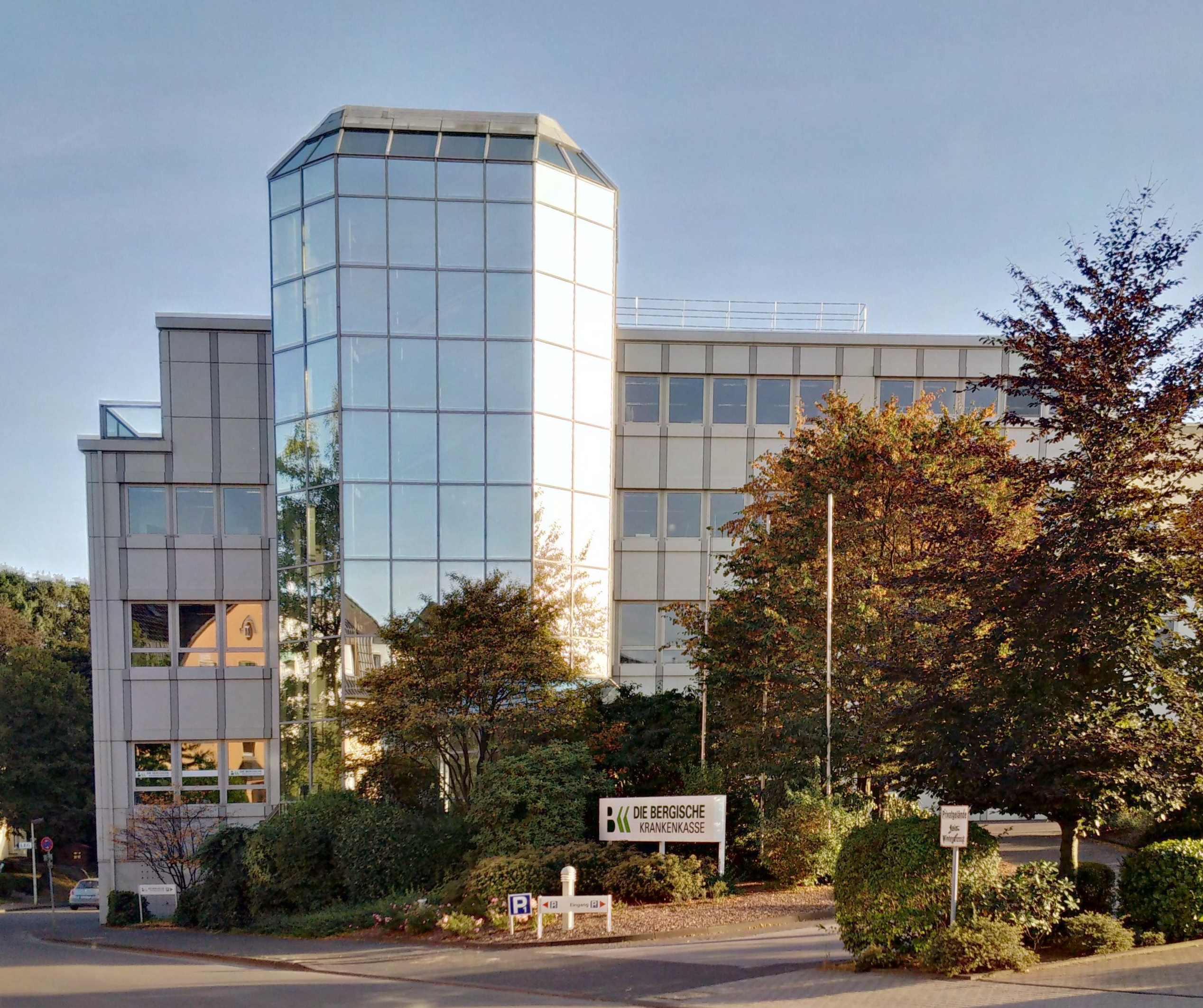 Hauptverwaltung der Bergischen Krankenkasse in Solingen-Wald, aufgenommen im Sommer 2016